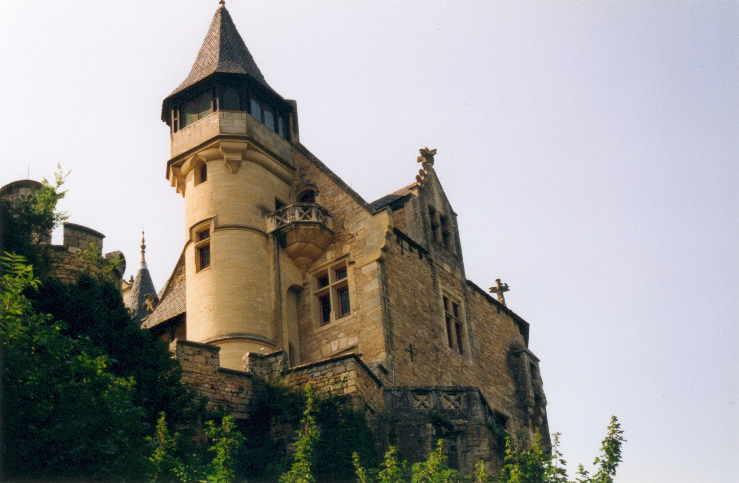 Château de Montfort, Dordogne, France